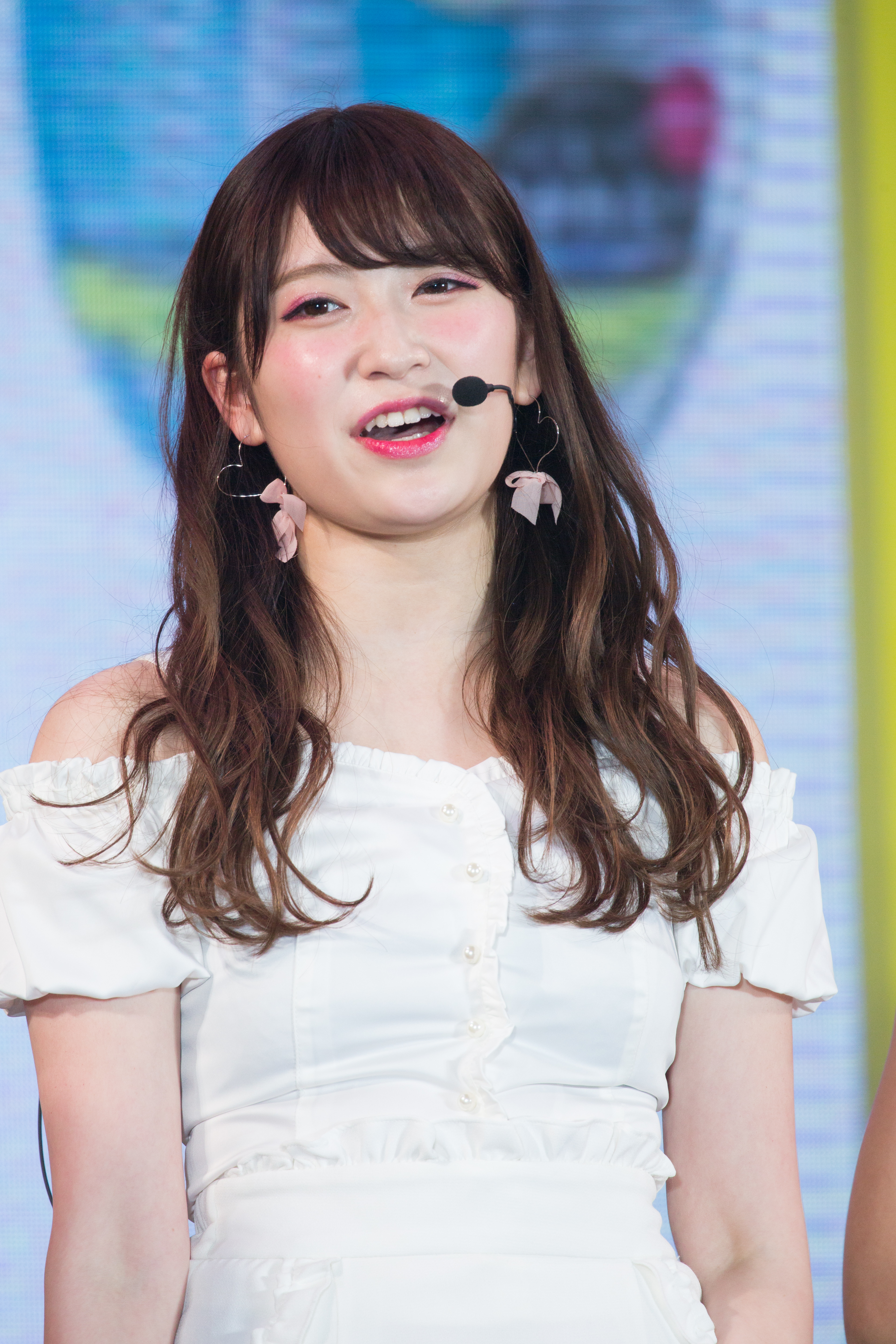 Super! C CHANNEL 2017 吉田朱里